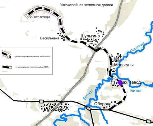 Узкоколейная железная дорога